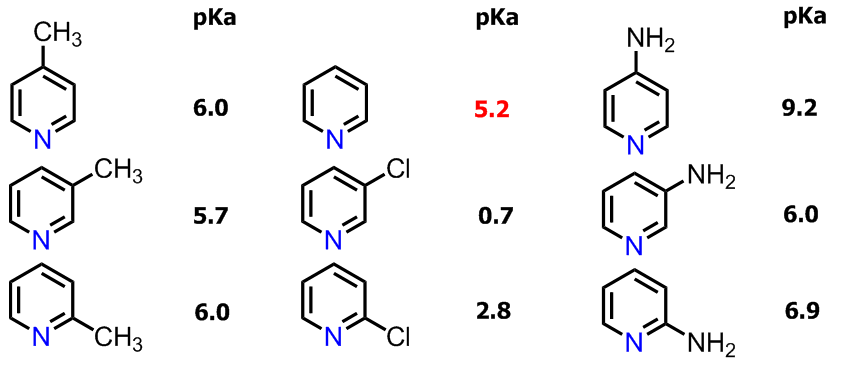 Effetti sulla basicità da parte dei sostituenti sulla piridina